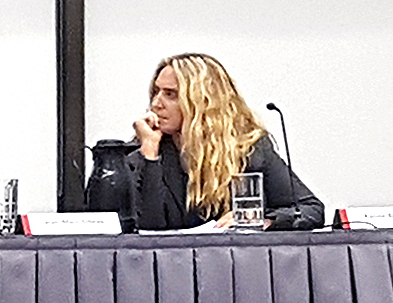 Séance du Conseil d'arrondissement de Ville-Marie du 13 septembre 2016. Karine Boivin Roy, conseillère de la Ville déléguée. Ville-Marie borough council meeting, 13 September 2016. Karine Boivin Roy, city councilor appointed by the mayor. Montréal, Québec, Canada, 13 September 2016.